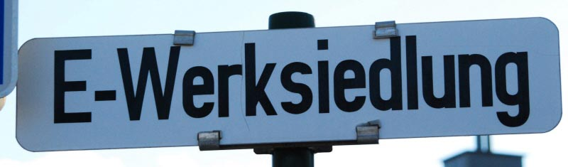 Straßentafel "E-Werksiedlung" in Ebenfurth in Niederösterreich